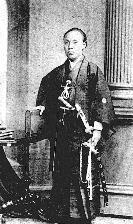 Portrait of Maejima Hisoka (前島密, 1835 – 1919)